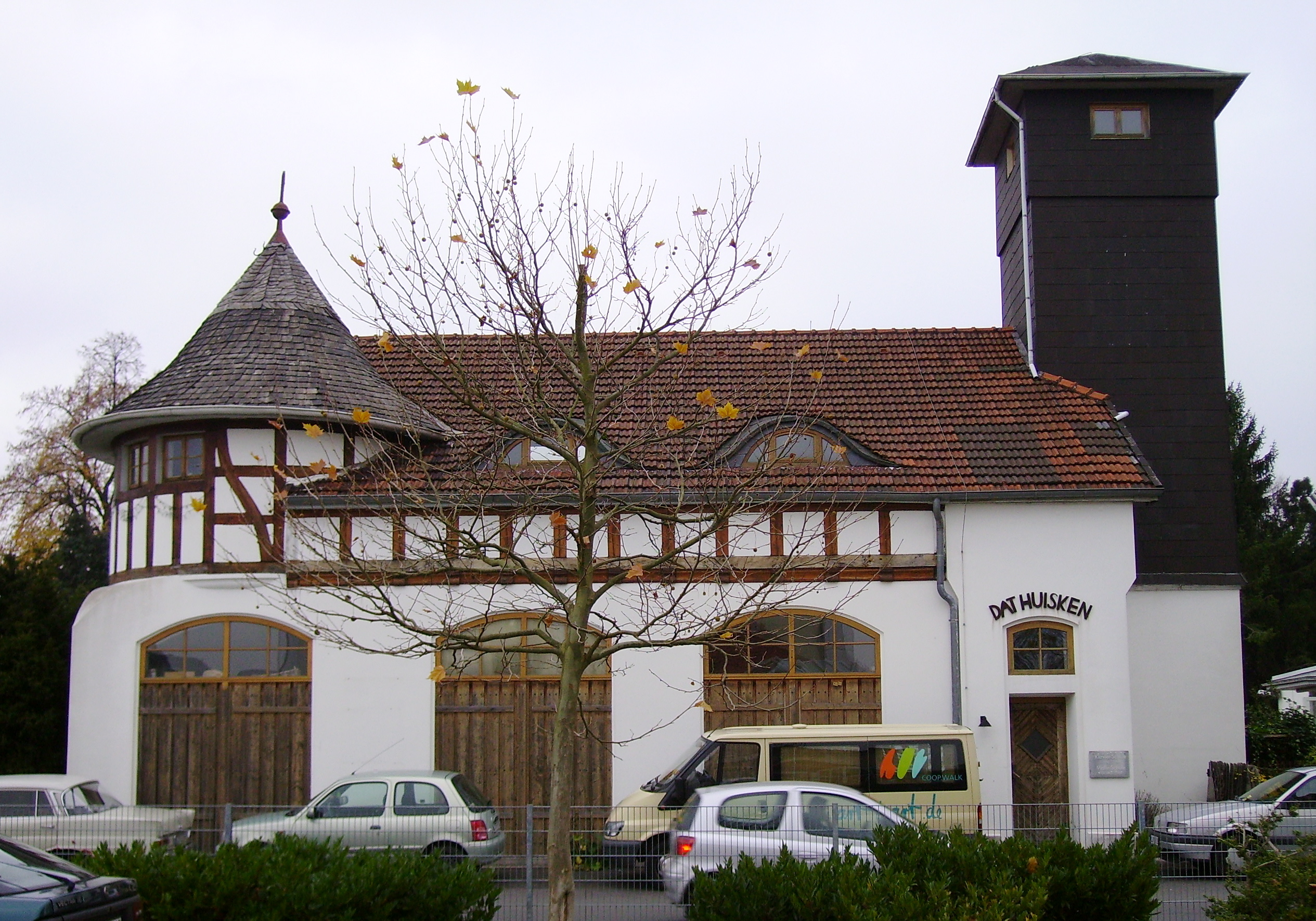 renoviertes Feuerwehrhaus von Hoffmann's Stärkefabrik in Salzuflen